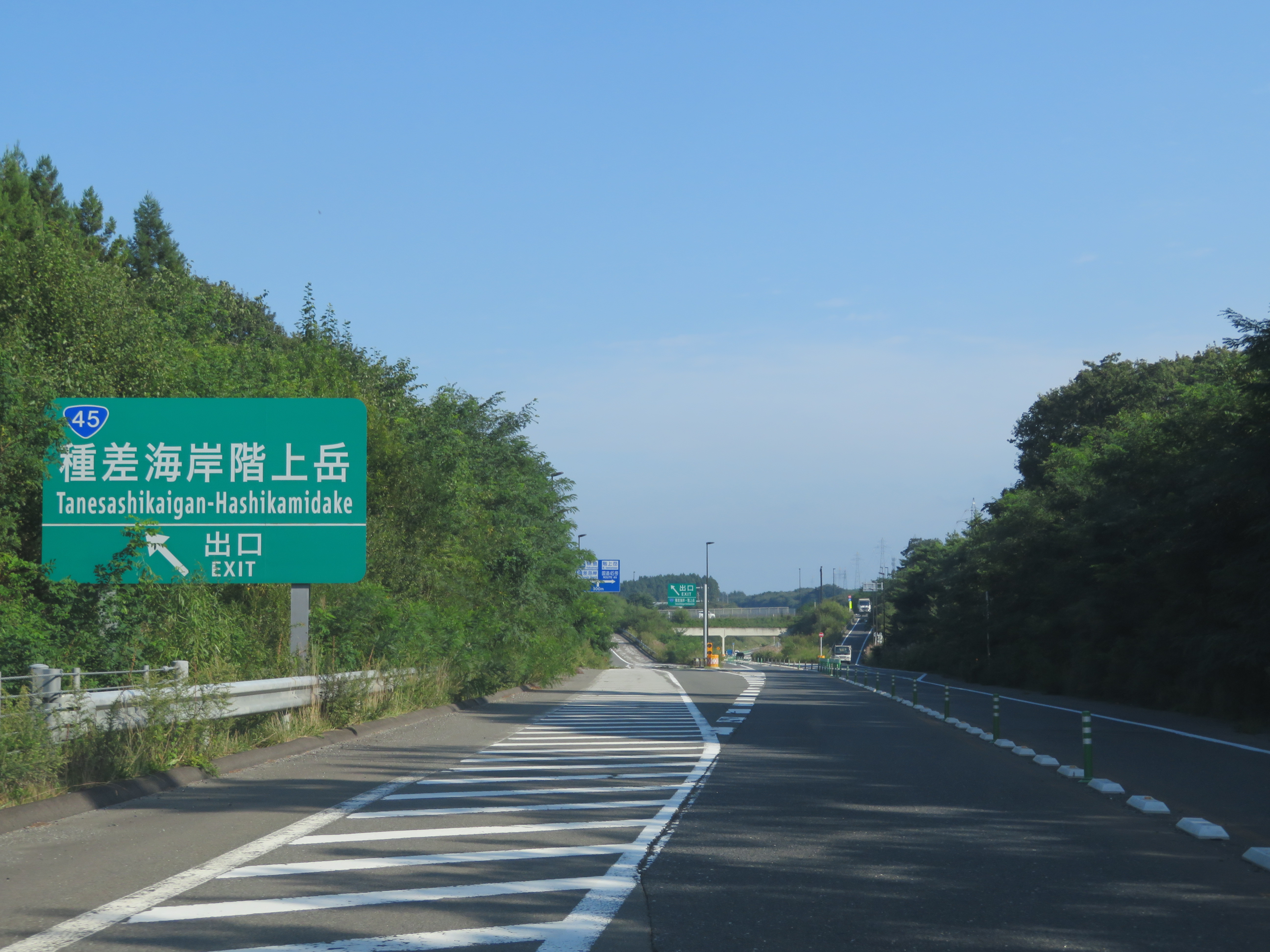 八戸久慈自動車道種差海岸階上岳インターチェンジ出口付近（八戸JCT方面側から撮影）